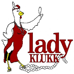 Logo for studinekoret Lady Klukk